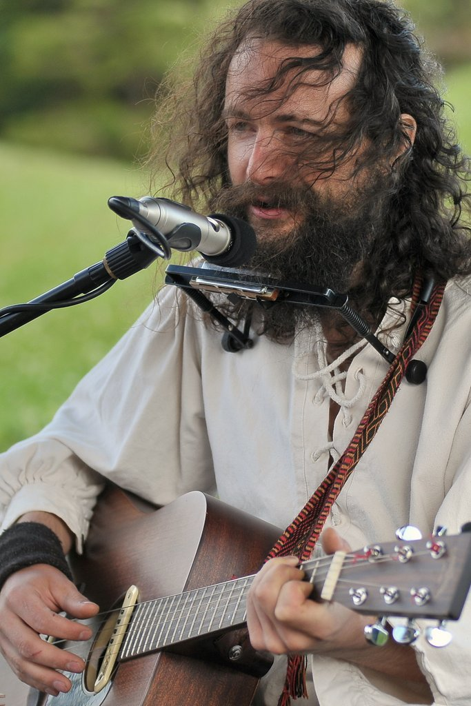 Kendy John Kretzschmar auf Liedertour im Erzgebirge 2012 (Fotograph Eck Gloger)